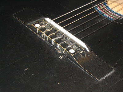 Guitar bridge